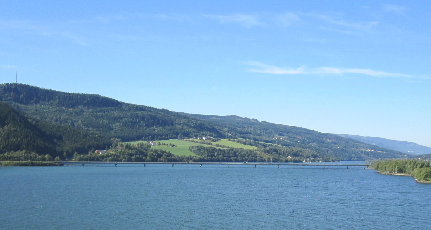 Lillehammer bro med E6